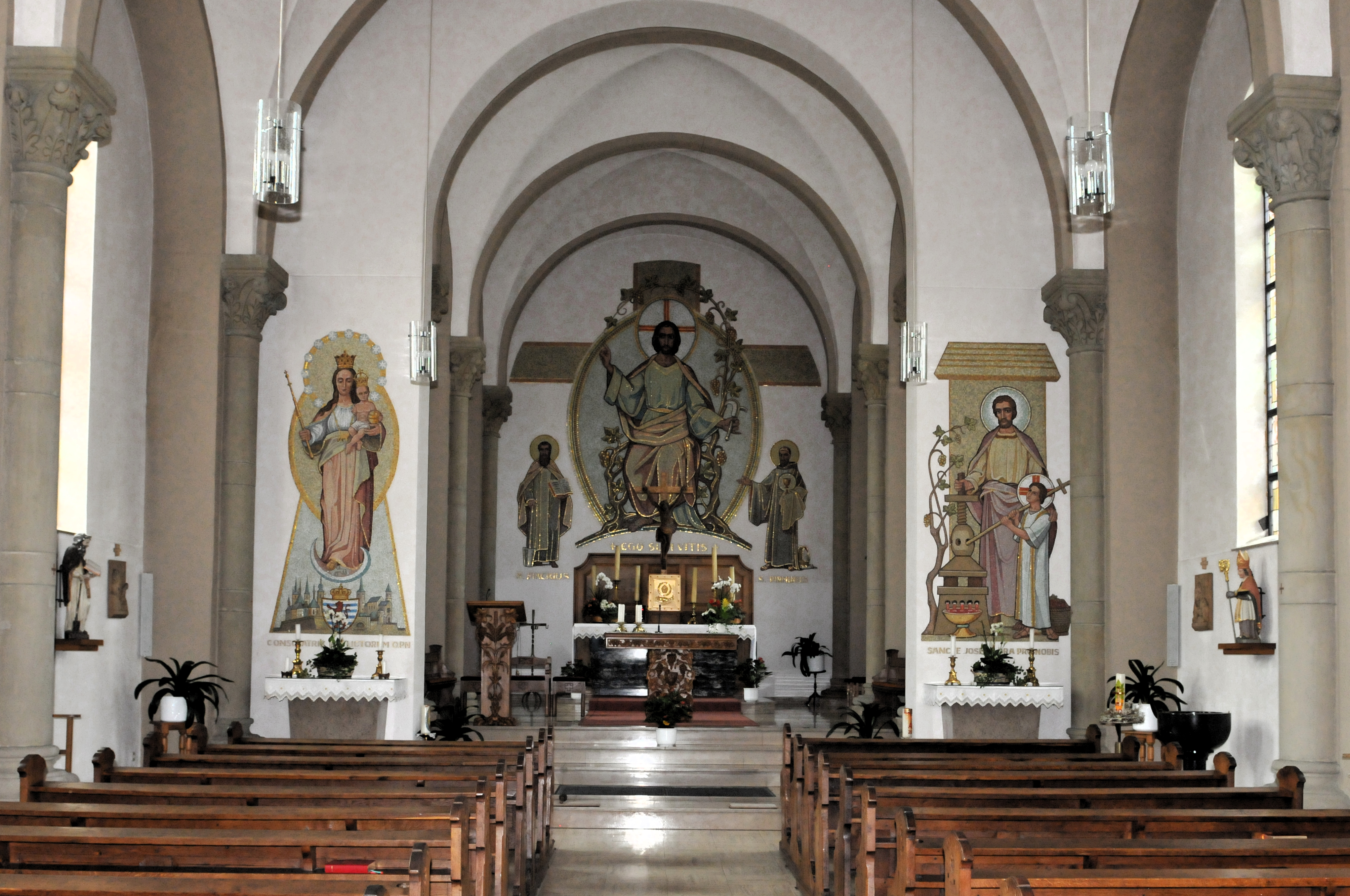 De Chouer an d'Altär an der Schwéidsbenger Kierch.